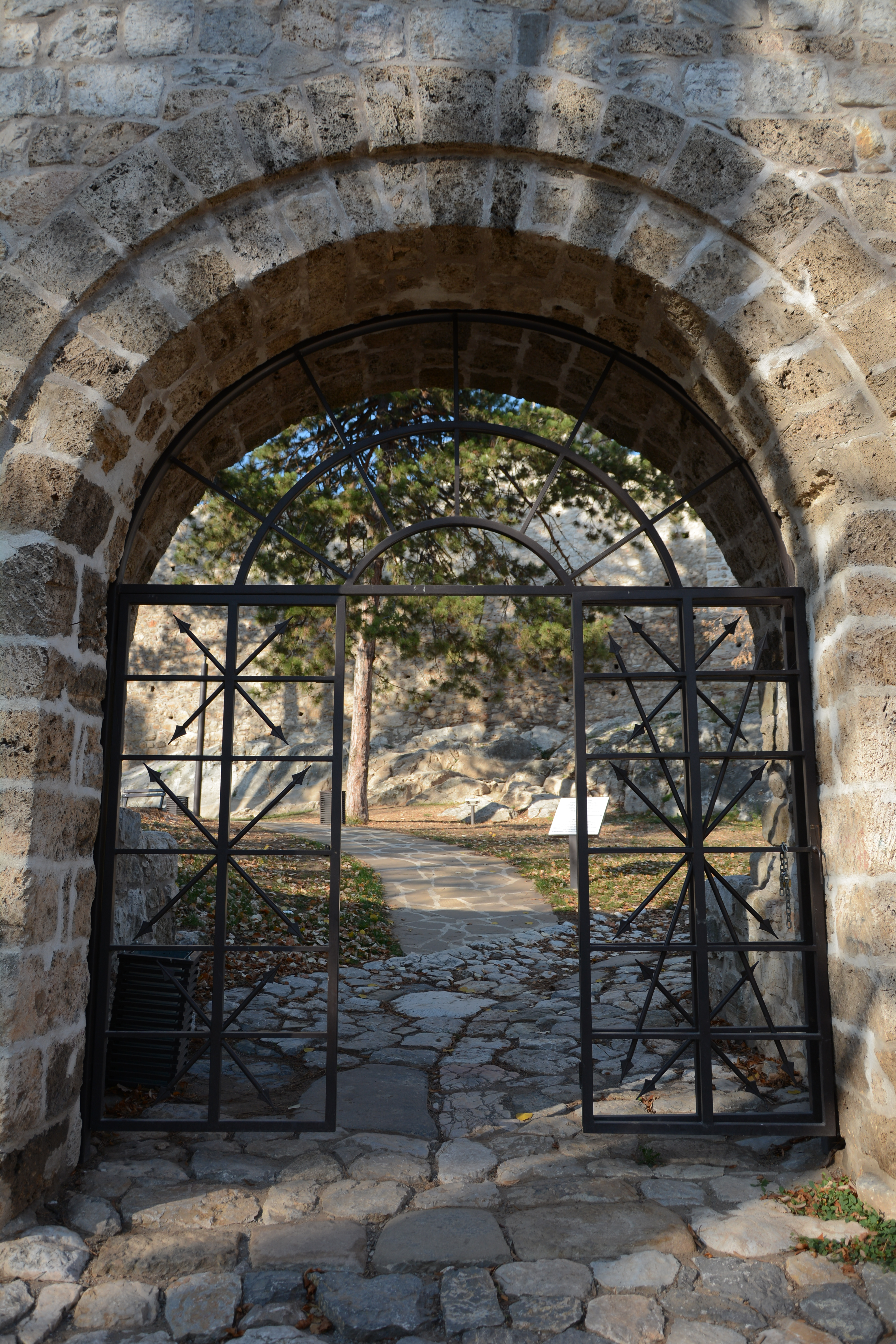 Тврђава кале, Момчилов град